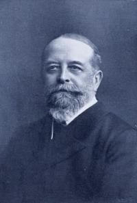 Karel Pawlík (1849 - 1914), Český lékař-gynekolog.